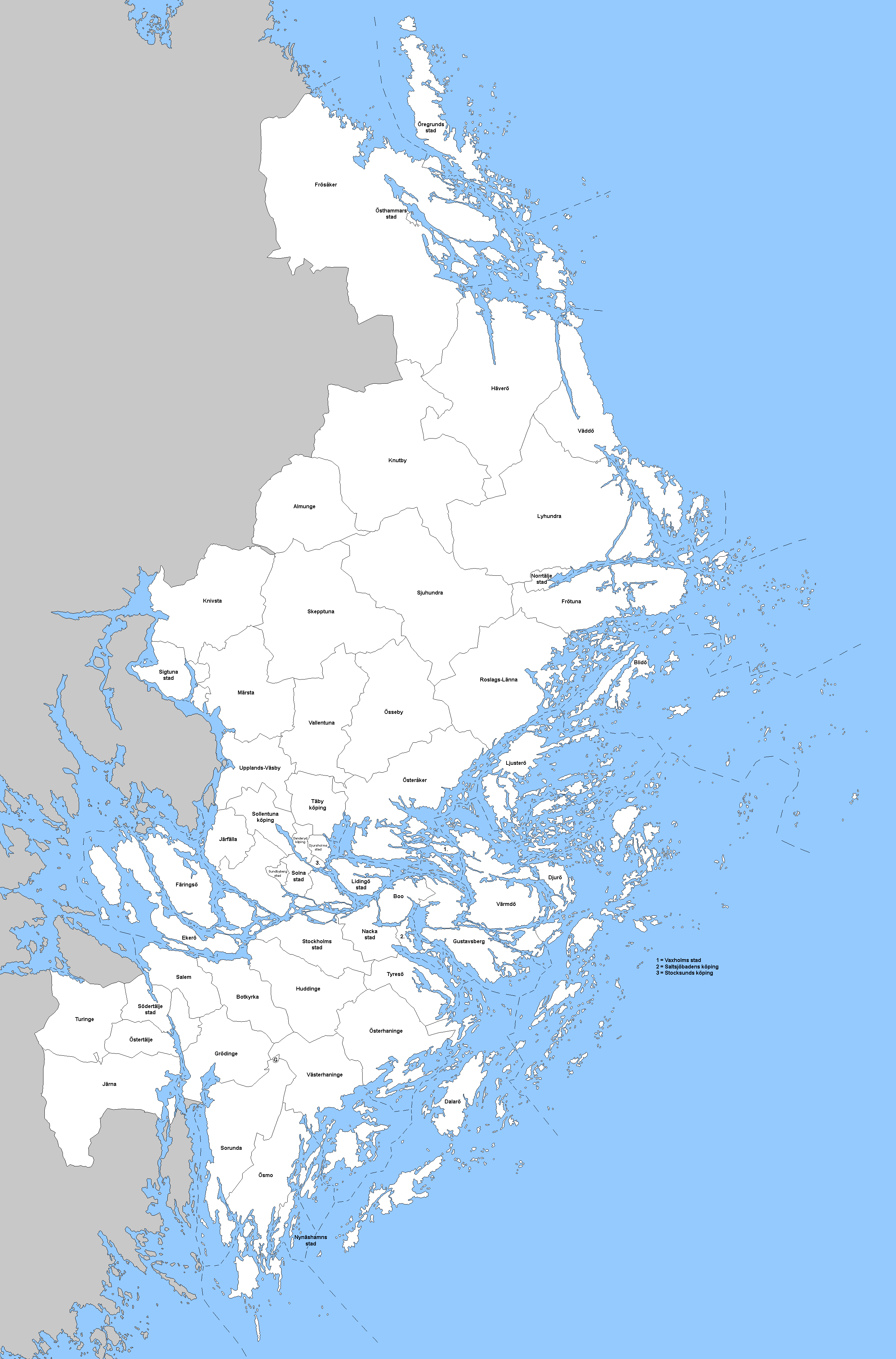 Kommunerna i Stockholms stad och Stockholms län den 1 januari 1952